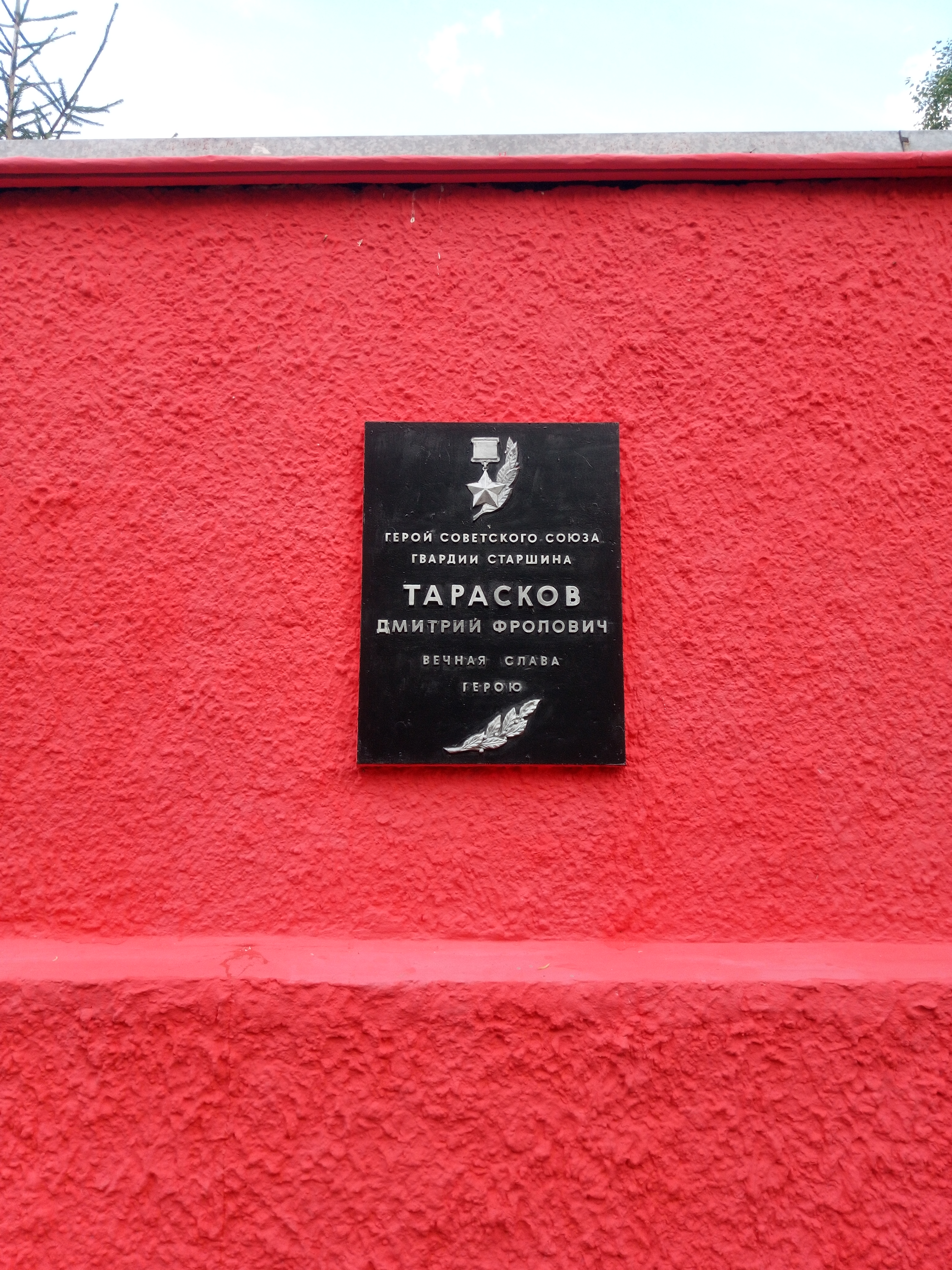 Мар’іна Горка. Мемарыял 8-ай танкавай дывізіі